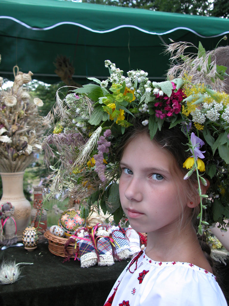 Міжнародний фольклорний фестиваль "Країна Мрій" International folk fest 'Kraina Mriy', Kiev, Ukraine 2006 Kraina MriyDSCN0097